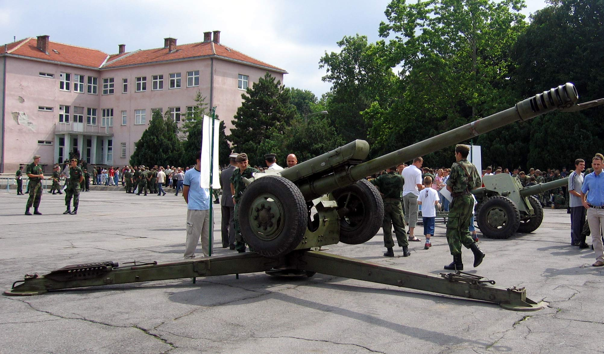 Хаубица Д-30 122мм